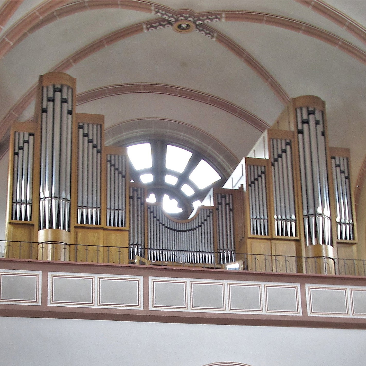 Orgelempore der Herz-Jesu-Kirche in Burbach, einem Stadtteil der saarländischen Landeshauptstadt Saarbrücken